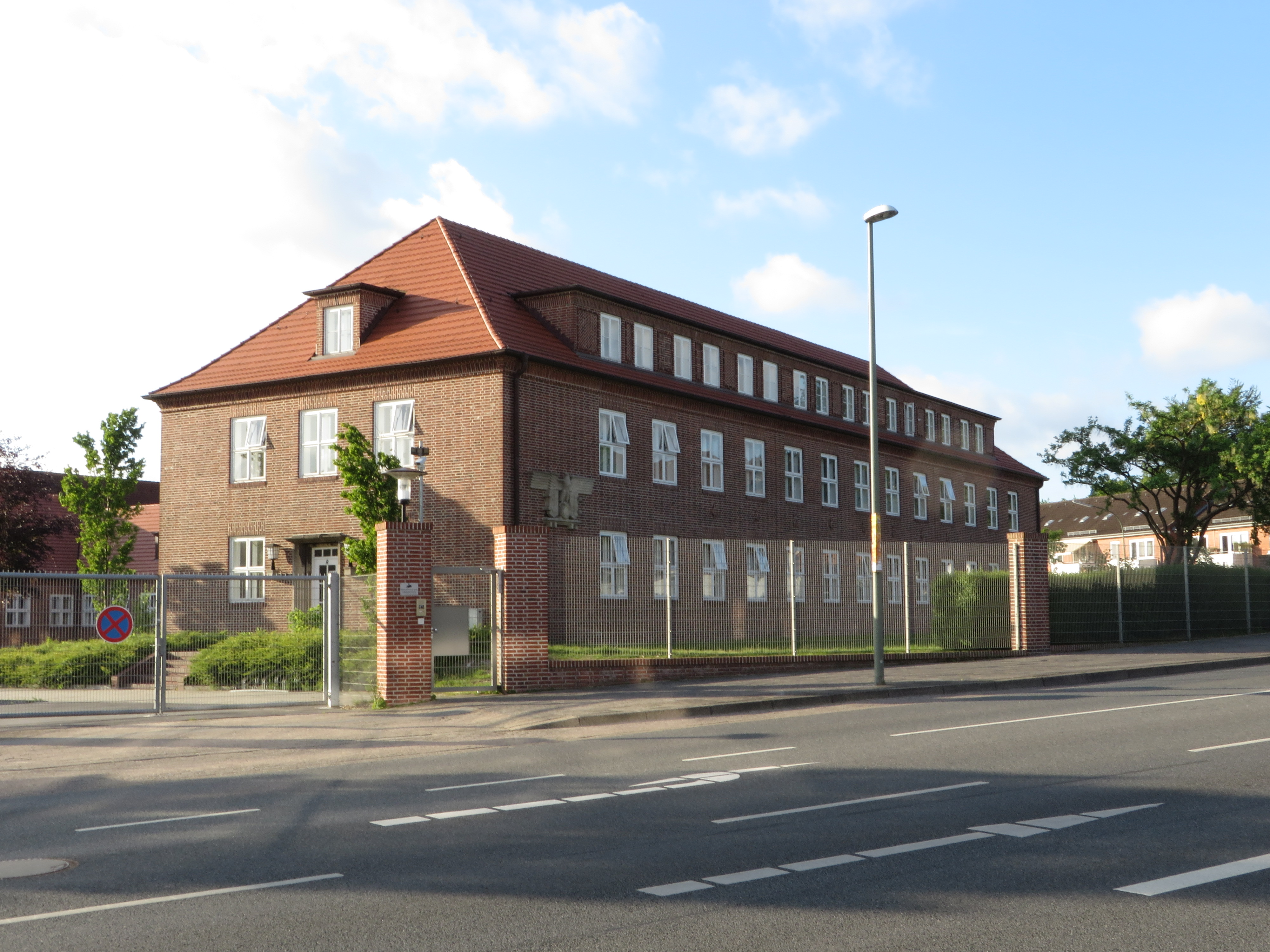 Die Sportschule Flensburg-Mürwik (Mai 2014), Bild 001